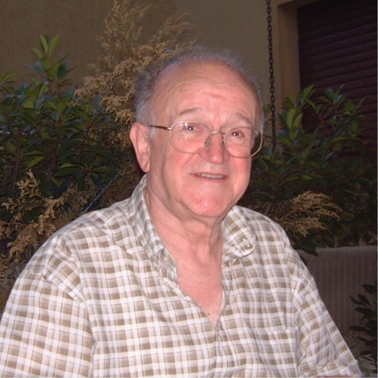 Giorgio Larocchi.